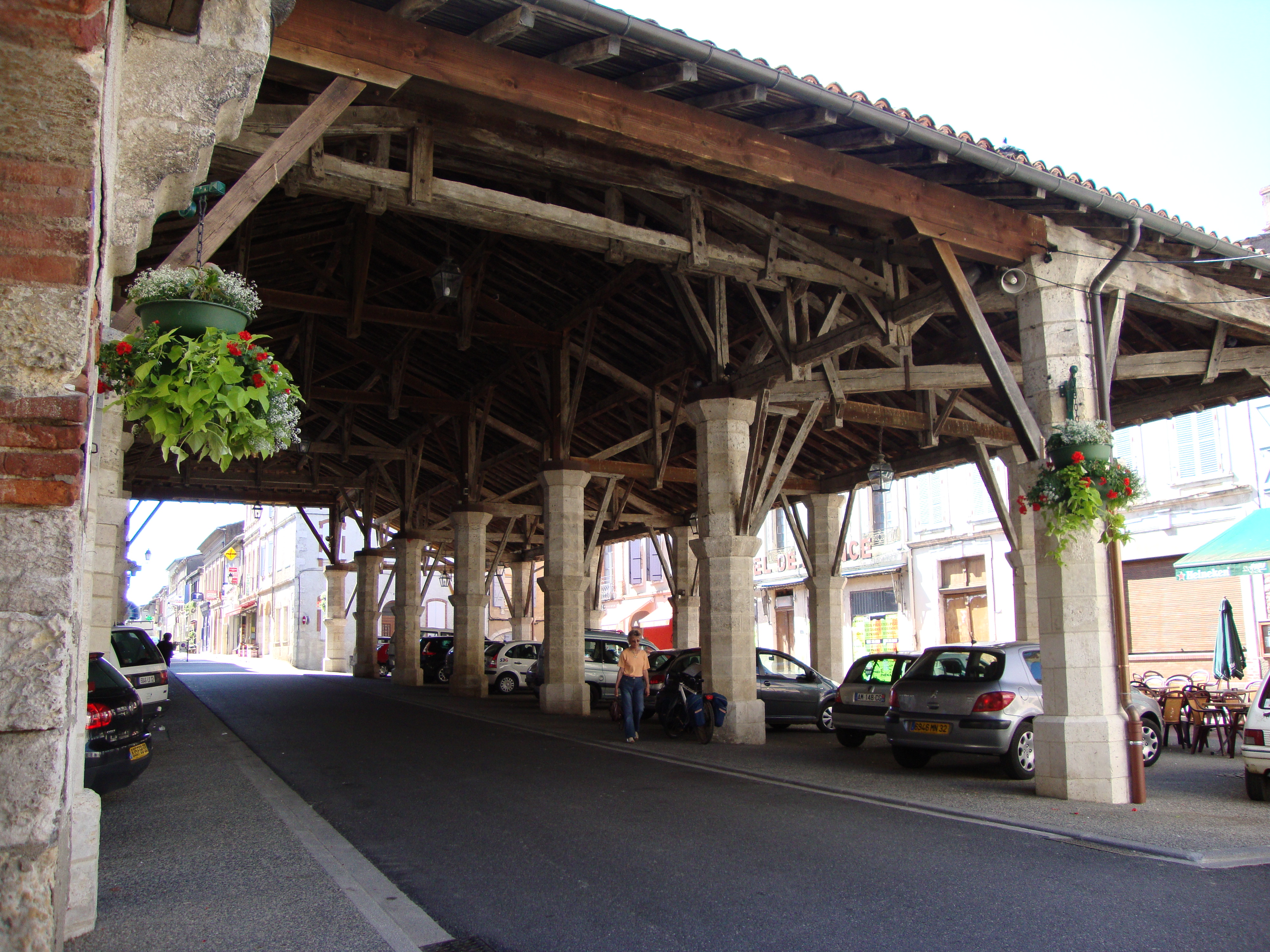 Gimont (Gers, Fr) les halles